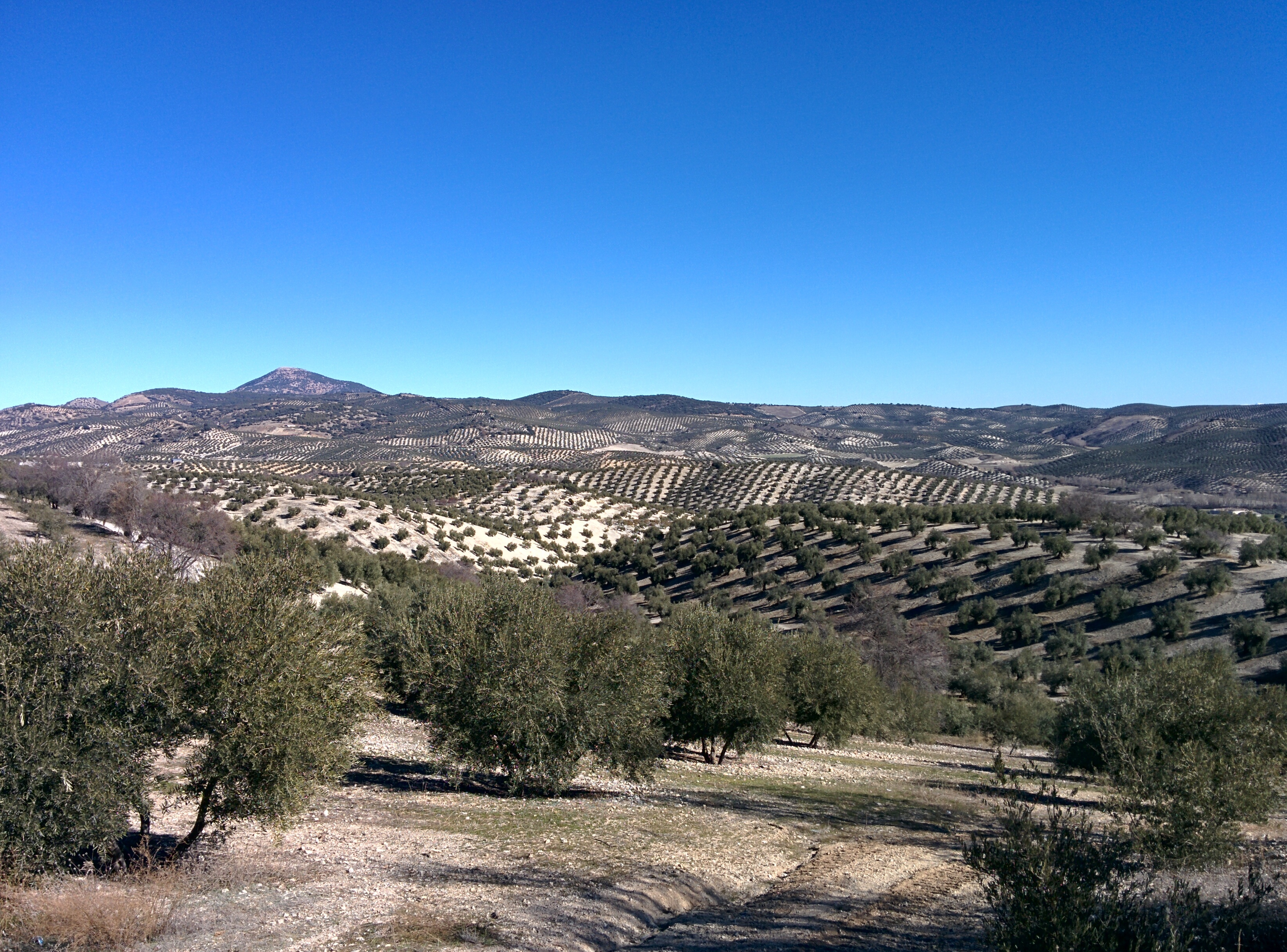 Campos de olivos al norte de la provincia de Granada (España).